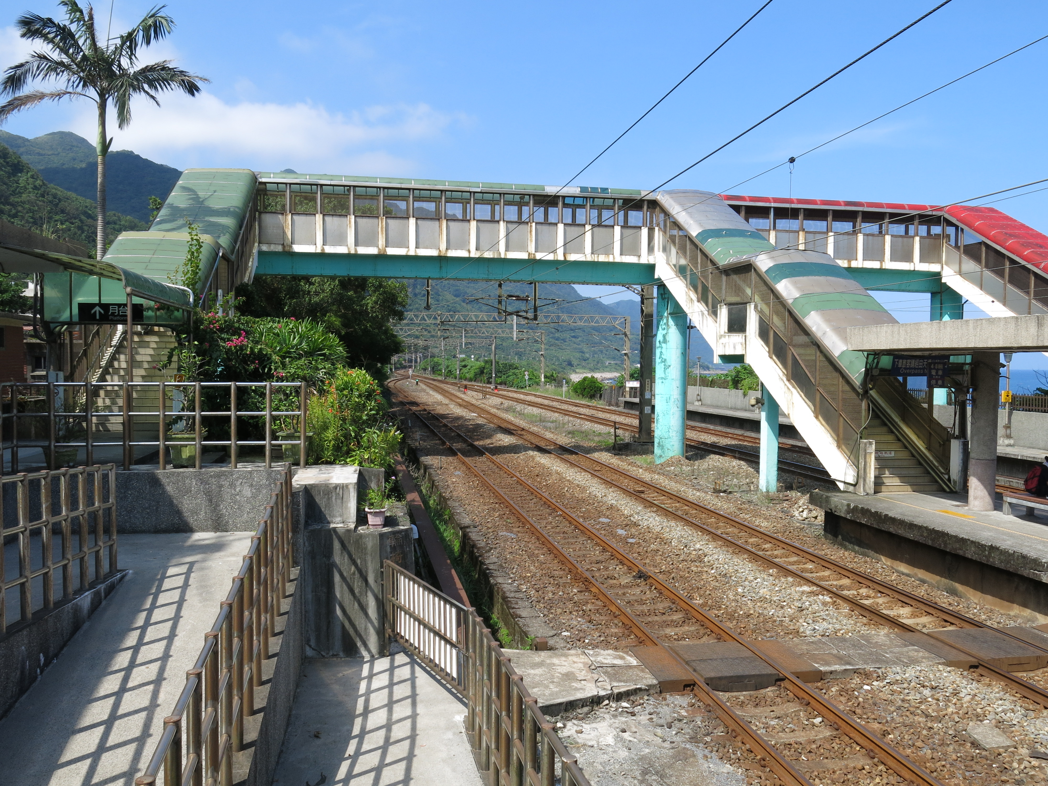 中文（台灣）: 台鐵大里車站天橋